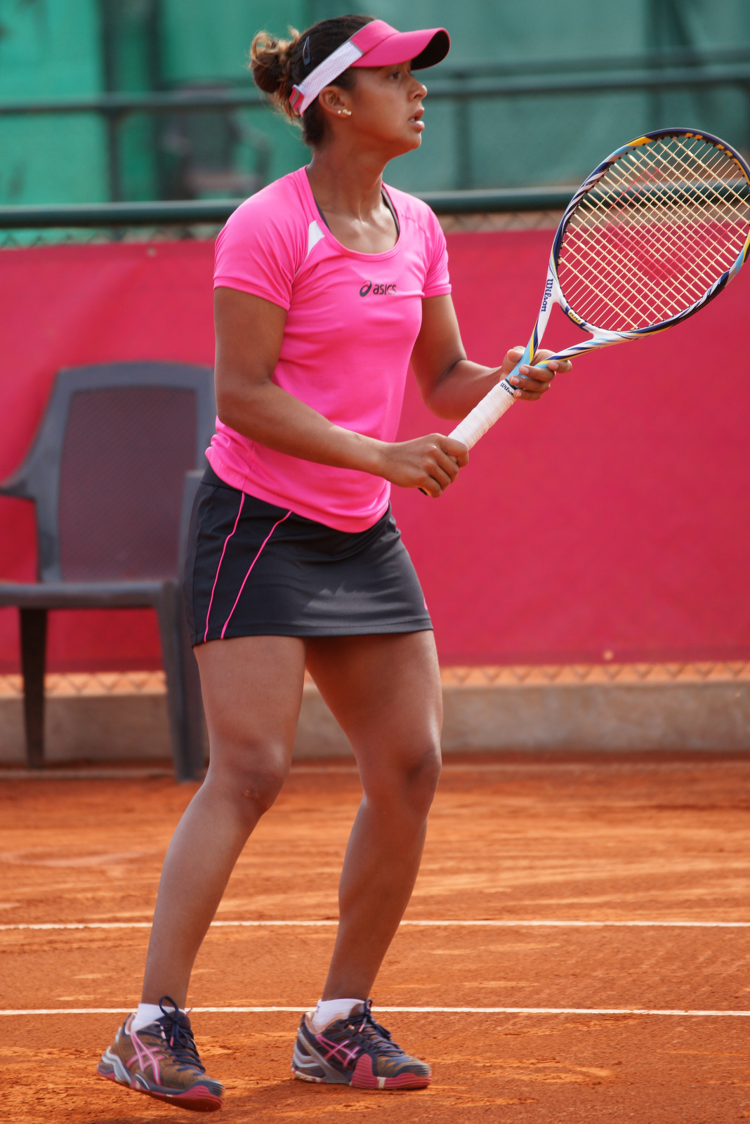 Teliana Pereira, Cagnes-sur-Mer 2013